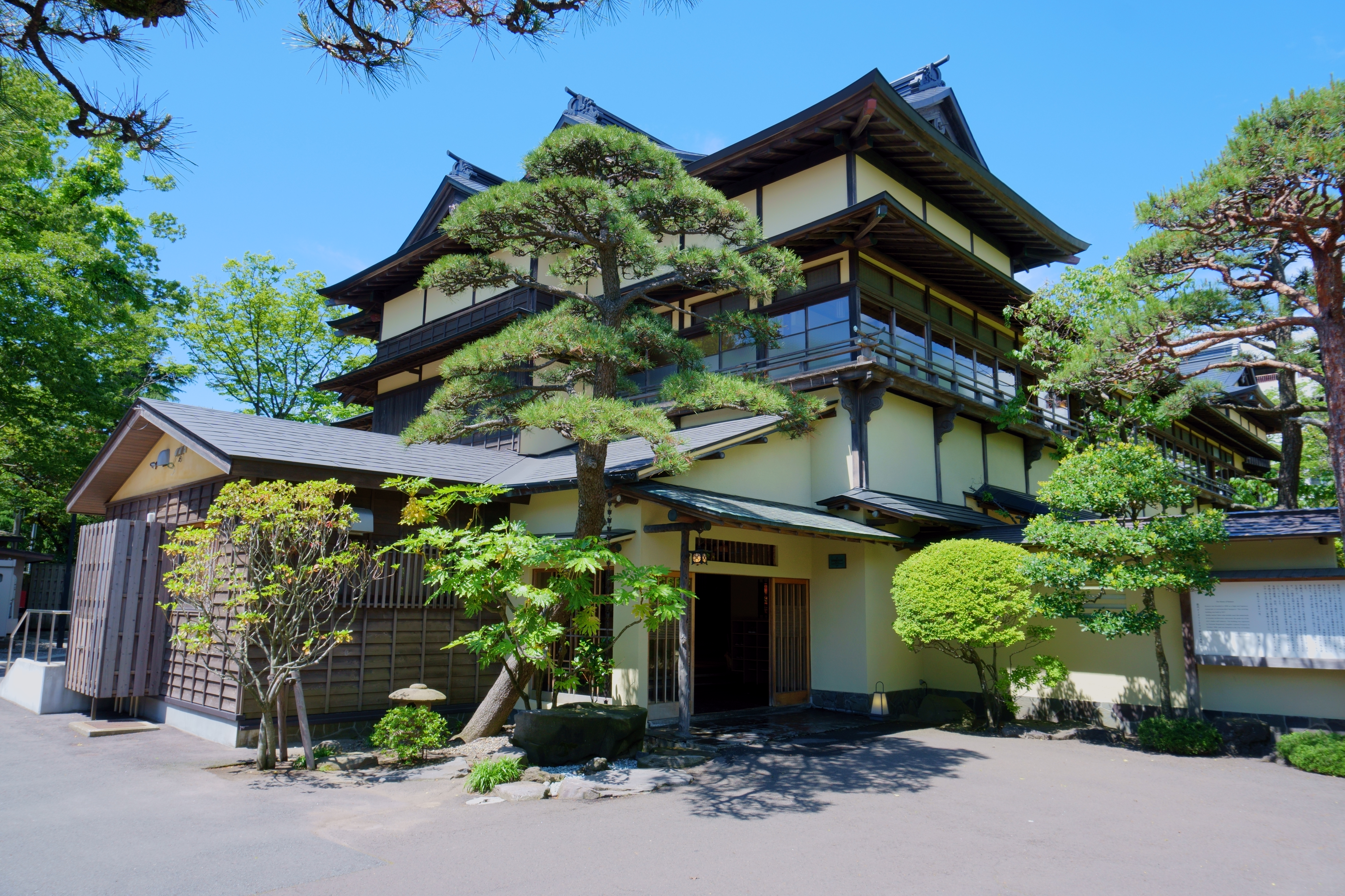 能代市観光交流施設、旧料亭金勇。秋田杉の天然材をふんだんに用いたかつての料亭で、2009年に料亭としては廃業し、施設が市に寄贈された。その後2013年に市の観光交流施設として再オープンしている。国の登録有形文化財に登録された豪奢な建物は、「東洋の木都」と称された工業都市、能代の往時の繁栄を伝える。